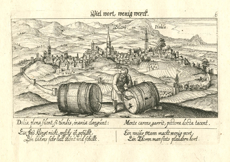 aus Daniel Meisner's Schatzkästlein “Blitri. in Italia”. (Velletri). Kupferstich aus “Daniel Meisner’s Schatzkästlein”, 1626 (Erstauflage). Ausgabe bei Eberhard Kieser, Frankfurt am Main